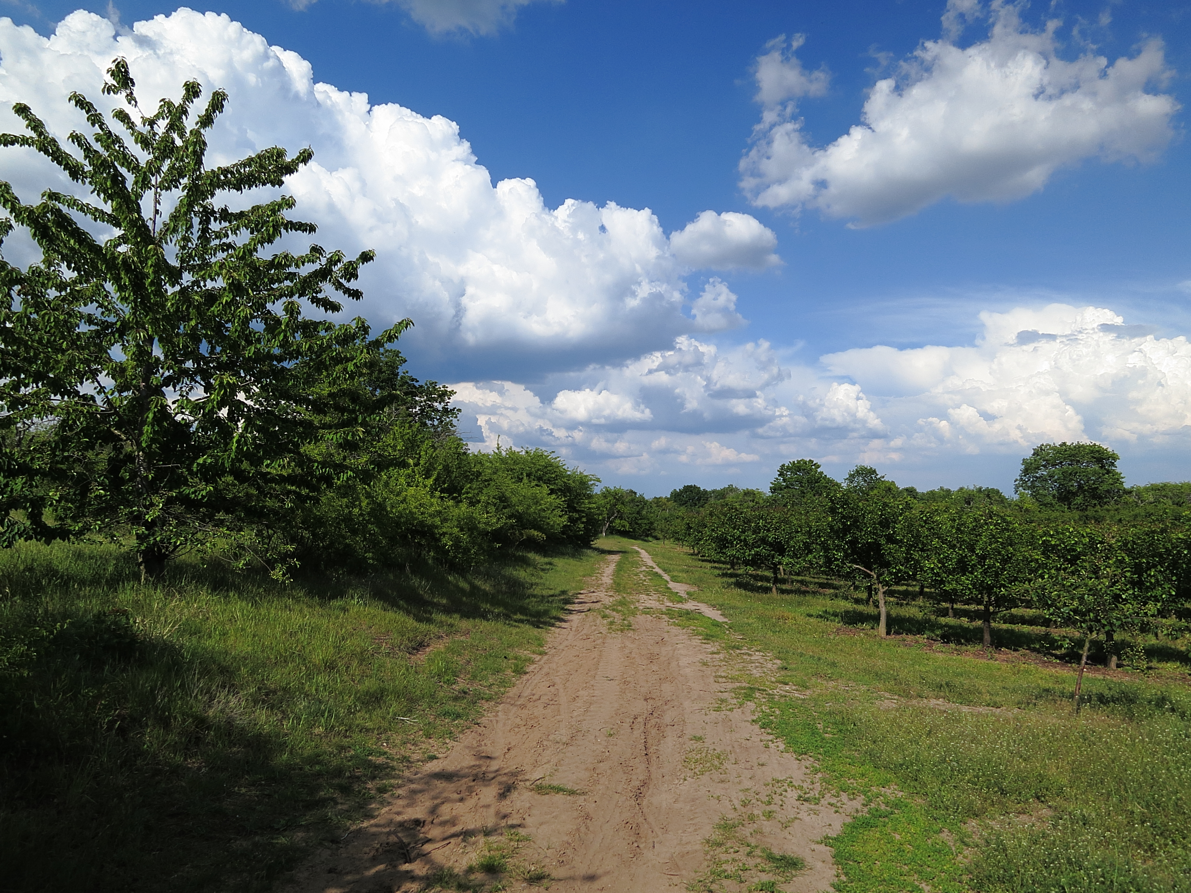 (NSG:RP-7315-056)_Höllenberg Blick Richtung Osten